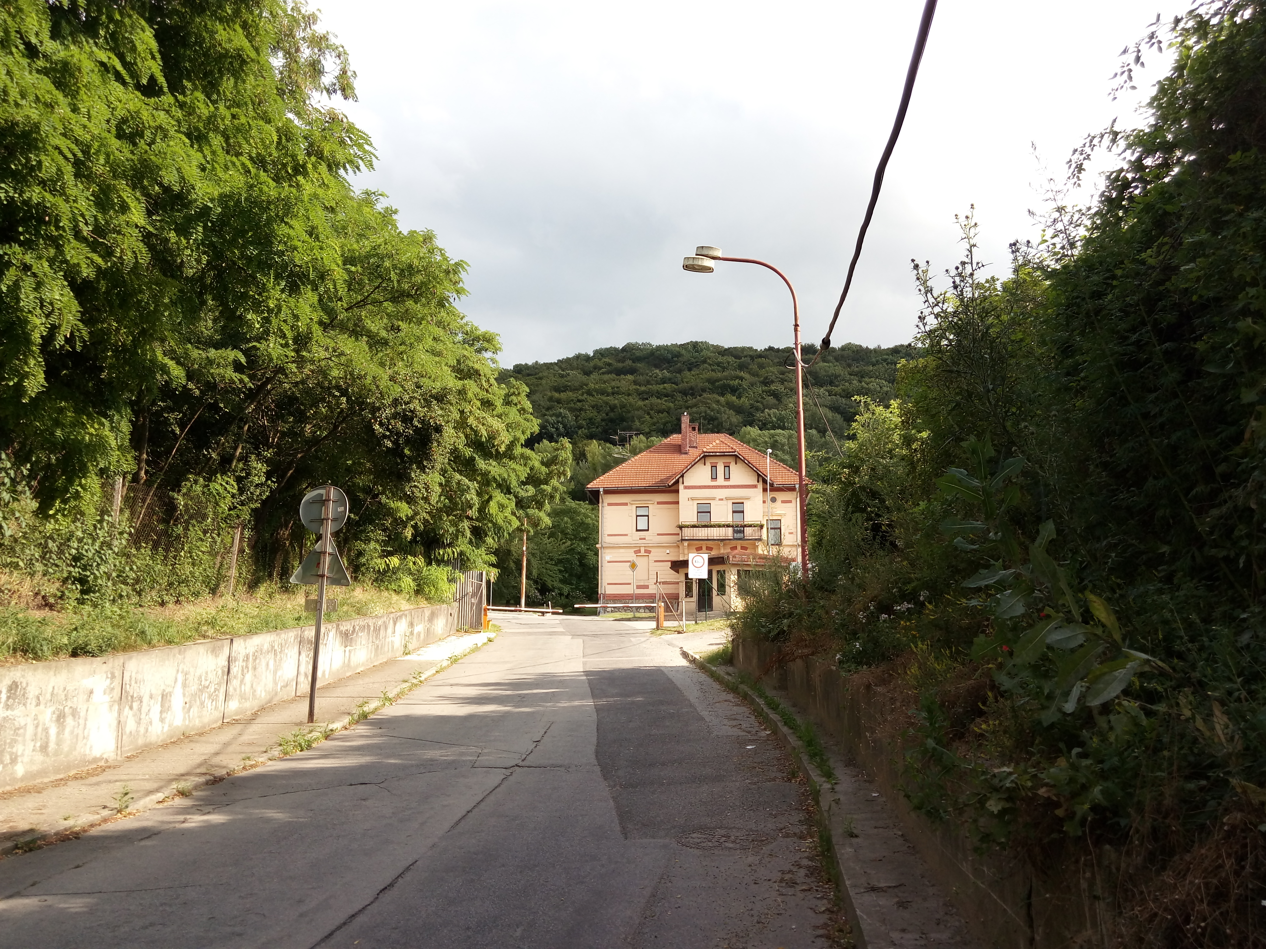 Vápenka, Devínska Nová Ves, Bratislava